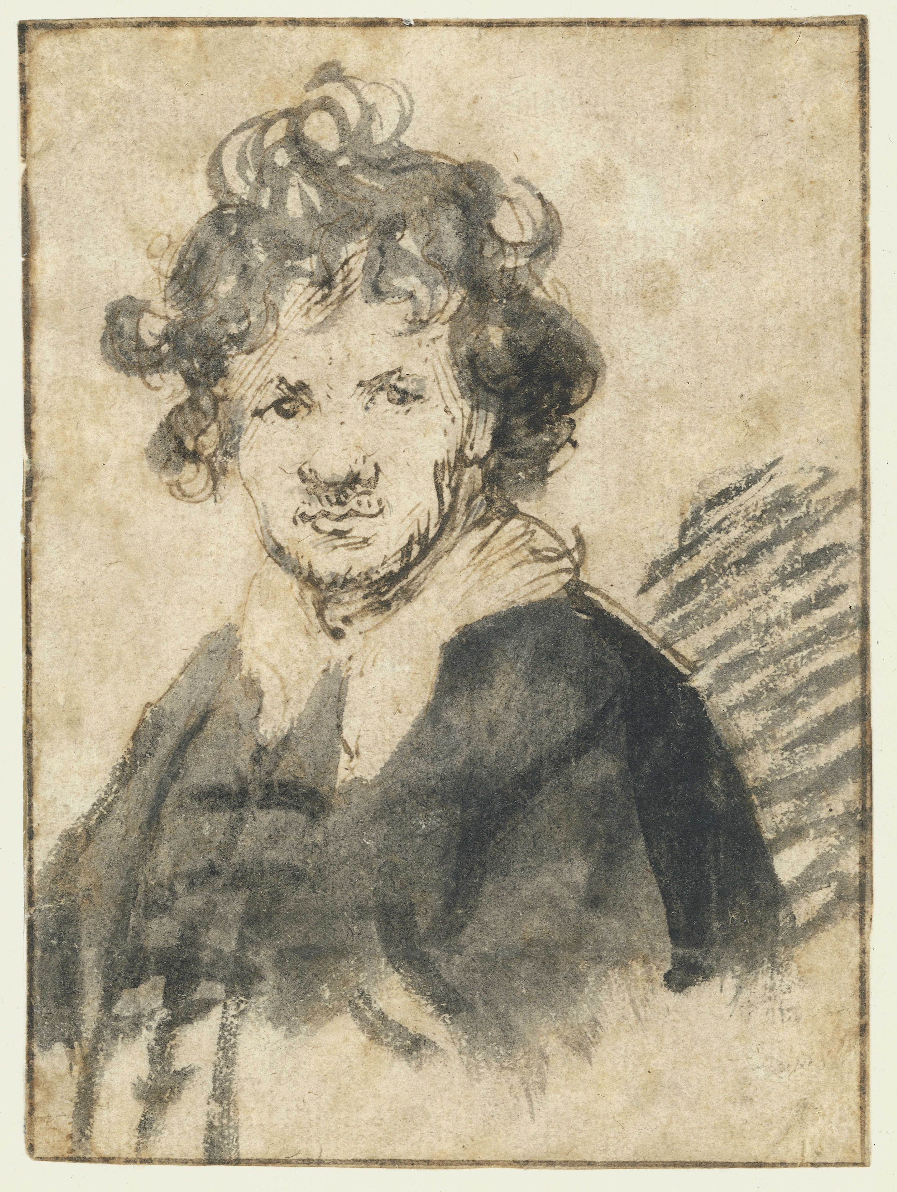 Self-portrait.